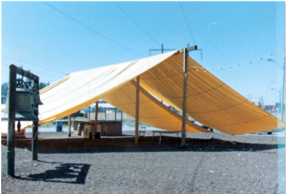 A la Izquierda campanas que actualmente siguen siendo utilizadas, al centro de la imagen lona improvisada para dar sombra durante la celebración.